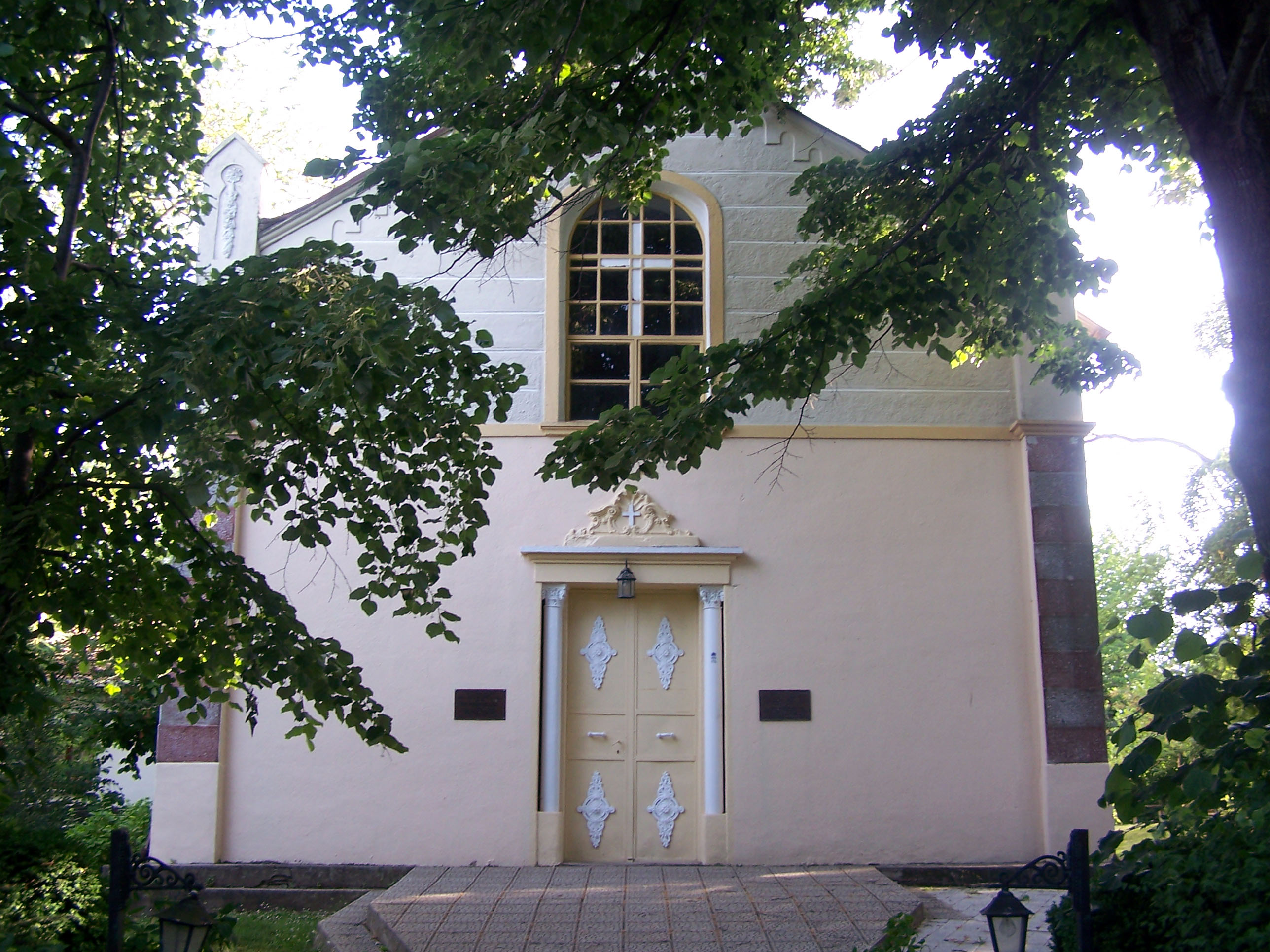 Church of Our Lady of Częstochowa in Polonezköy